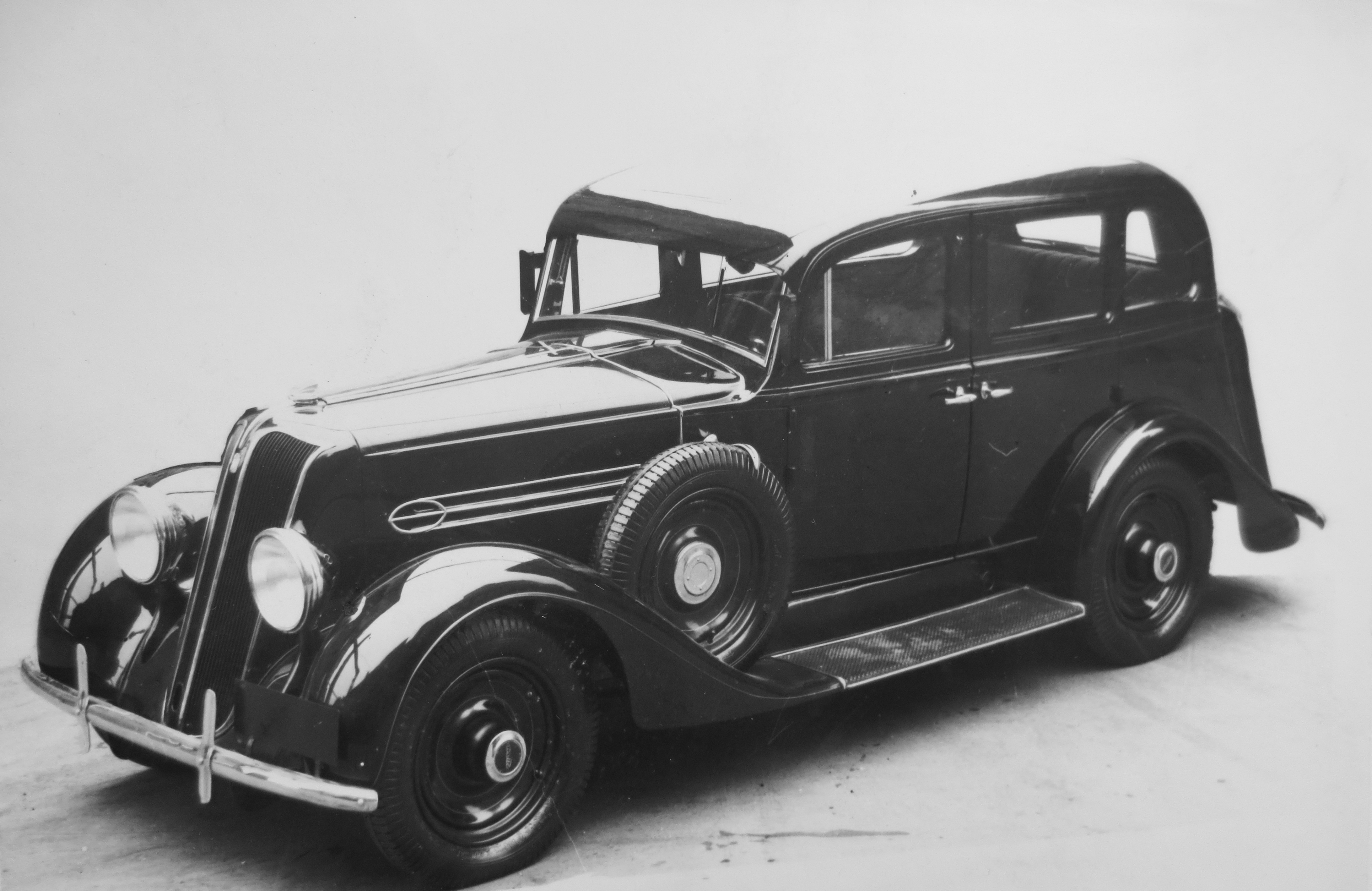 Walter Lord (1936) limuzína